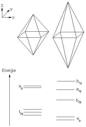 oben: oktaedrisches (links) und Jahn-Teller-verzerrtes (rechts) Ligandenfeld, unten: dazugehörige Energieniveaus der Molekülorbitale